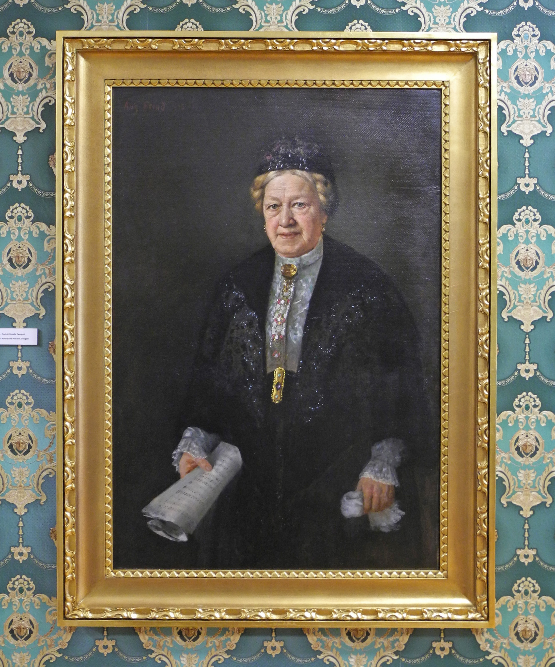 Bildnis der Rosalia Zweigelt aus Schönlinde (Krasná Lípa) von August Frind. Rosalia Zweigelt war die Tante von Hildegard und August Stradal.